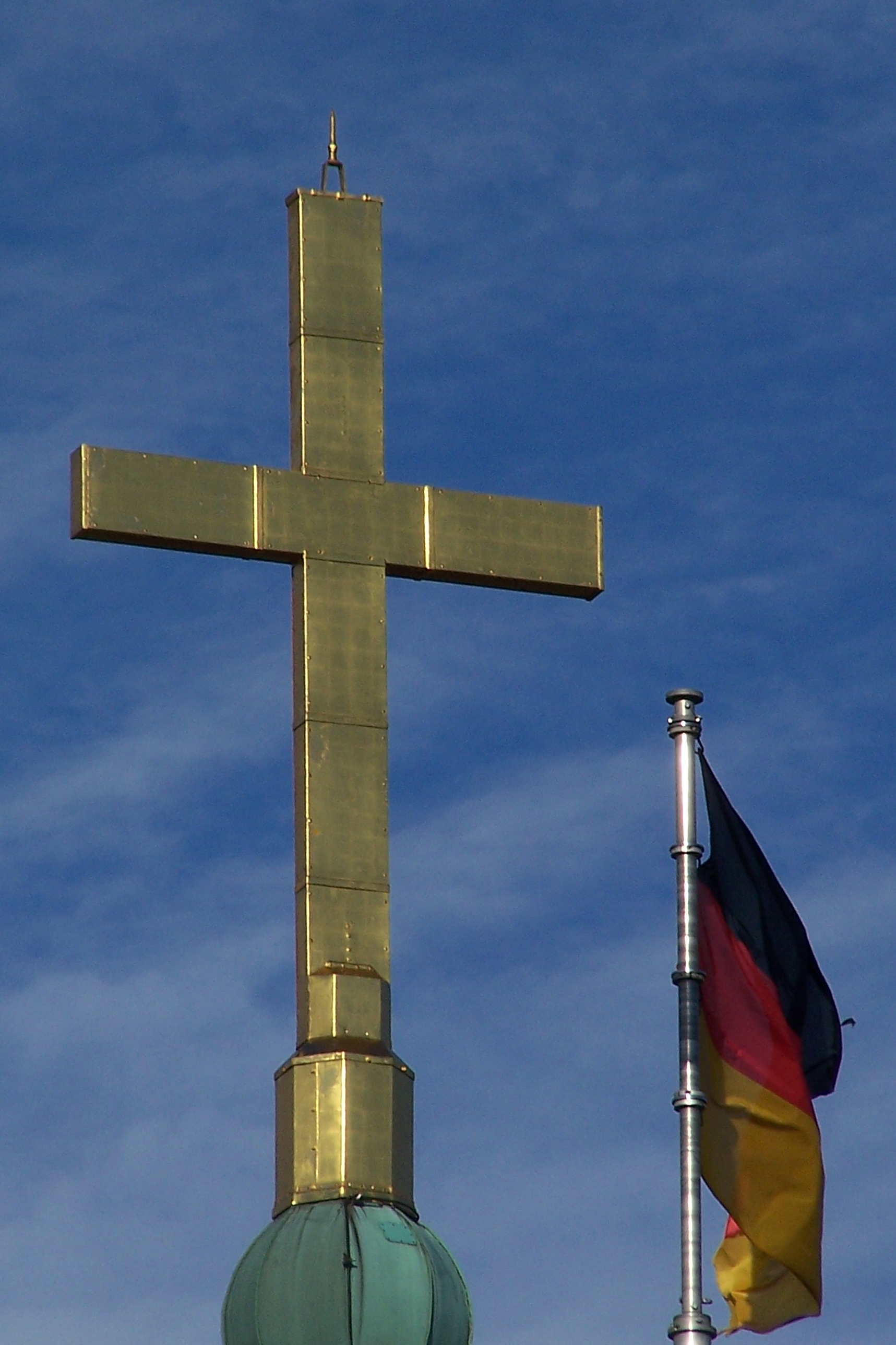 Detailansicht zum Kreuz auf dem Bergfried der Wartburg.